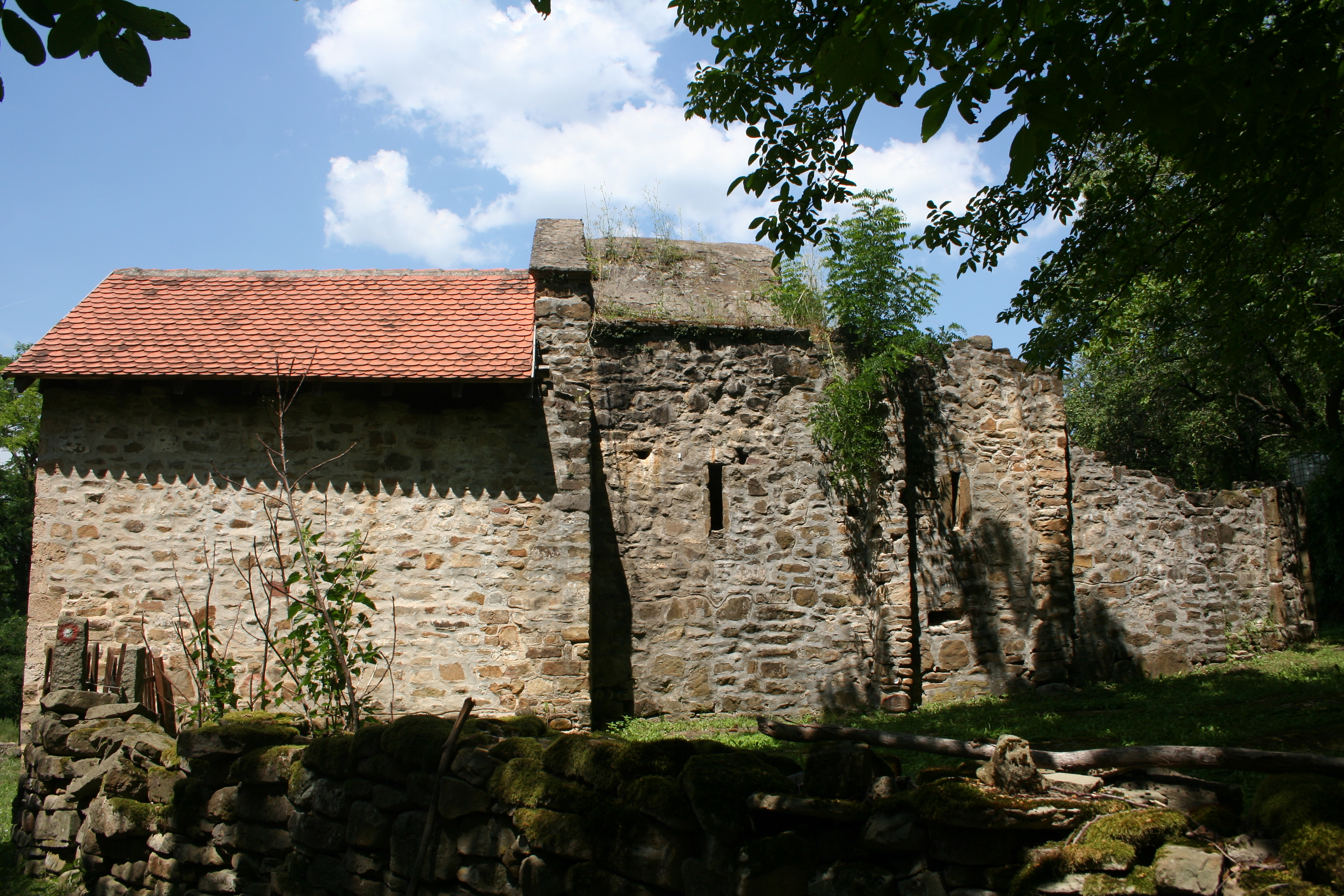 Ostaci manastira Vavedenja Presvete Bogorodice, Slavkovica